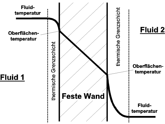 Wärmedurchgang, Wand mit beidseitiger Konvektion